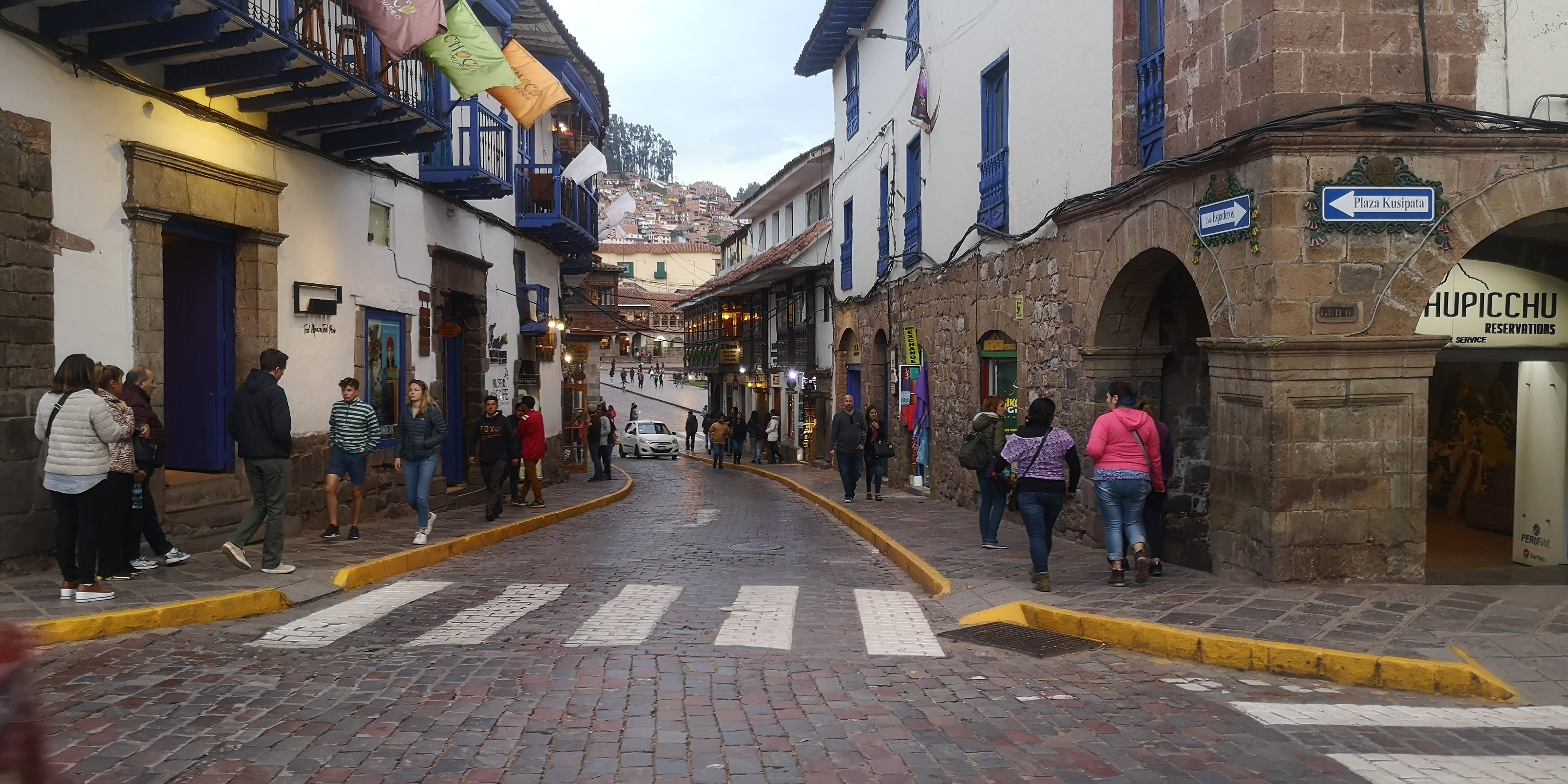 Vista de la Calle Espaderos en el Cusco, Perú